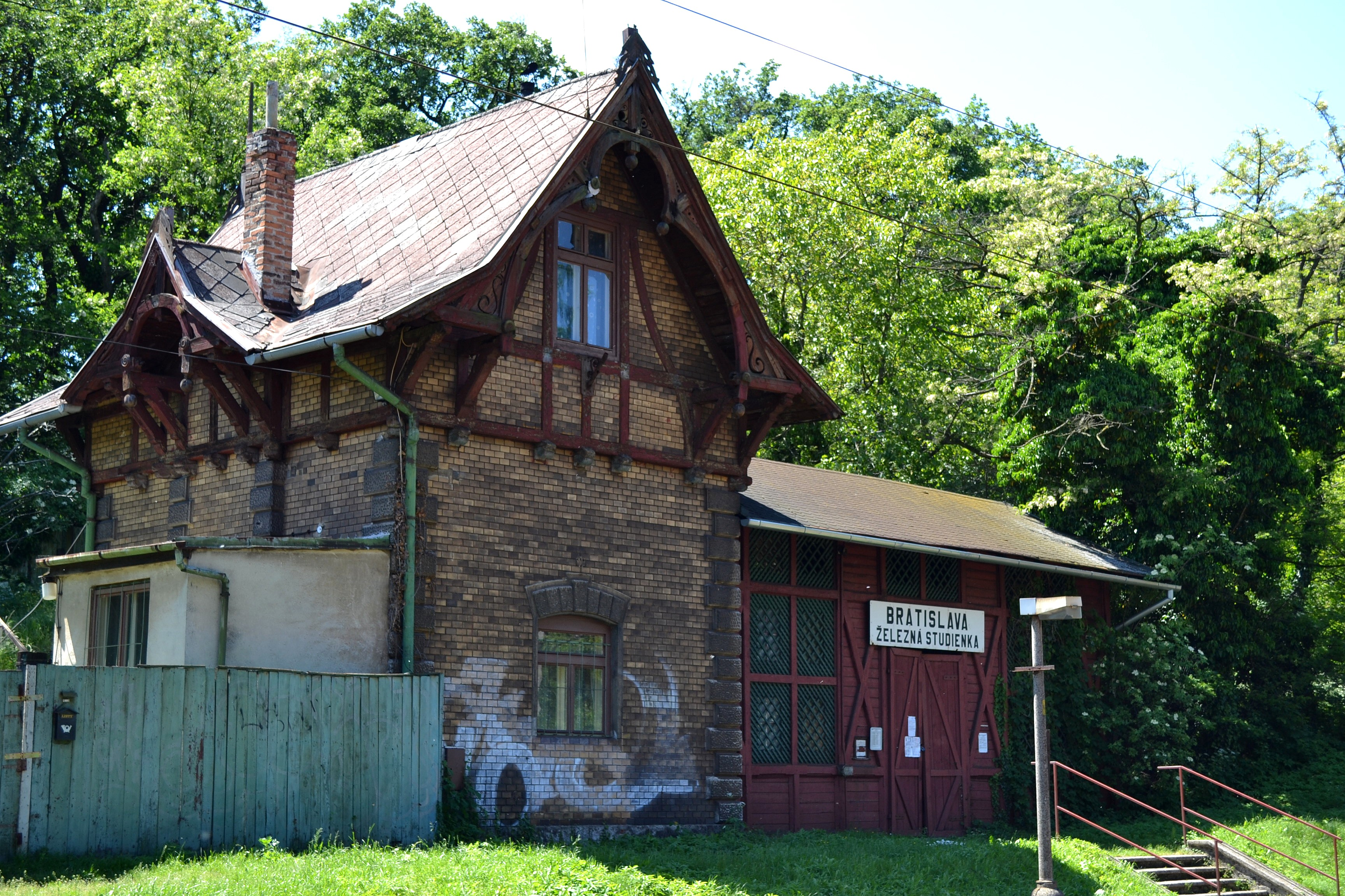 Budova železničnej stanice Bratislava-Železná studienka; celkový pohľad